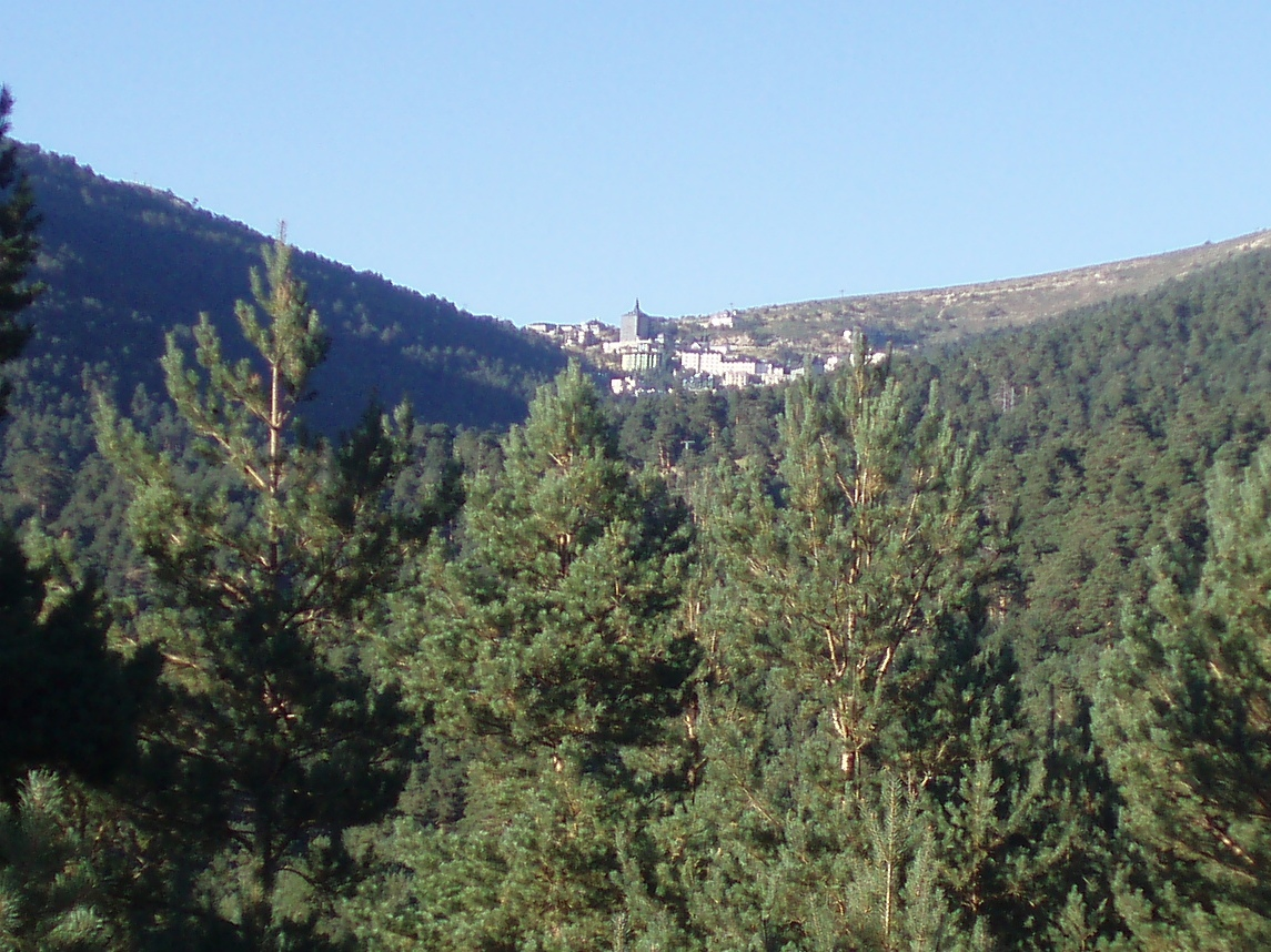 Puerto de Navacerrada visto desde la vertiente madrileña (España).